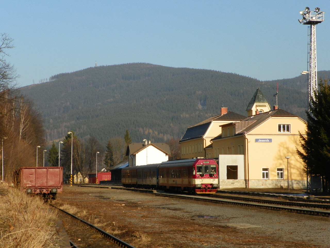 Jeseník vlakové nádraží v pozadí rozhledna Zlaty Chlum